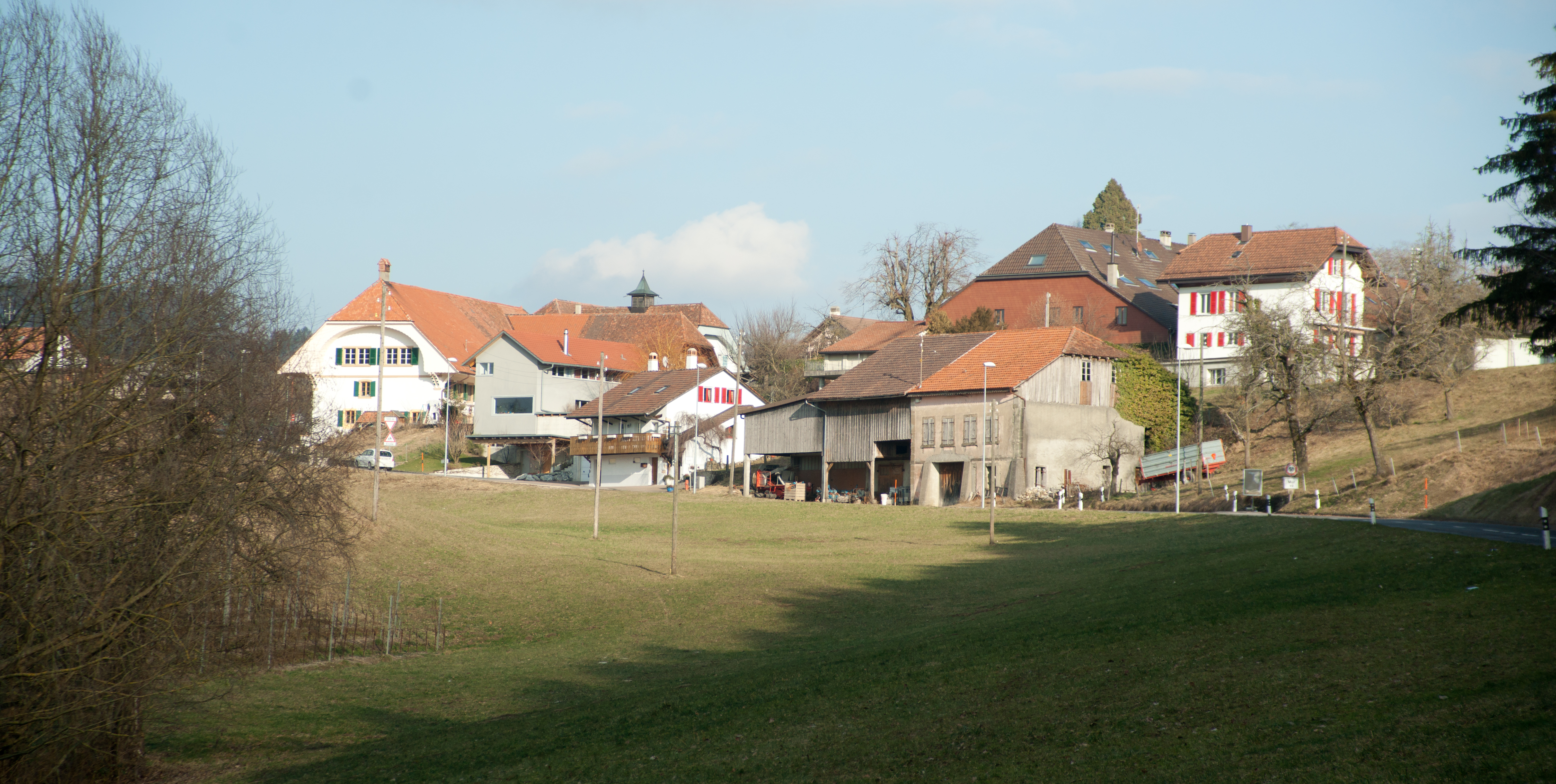 Vue d'ensemble du village de Mur, canton de Vaud, Suisse.